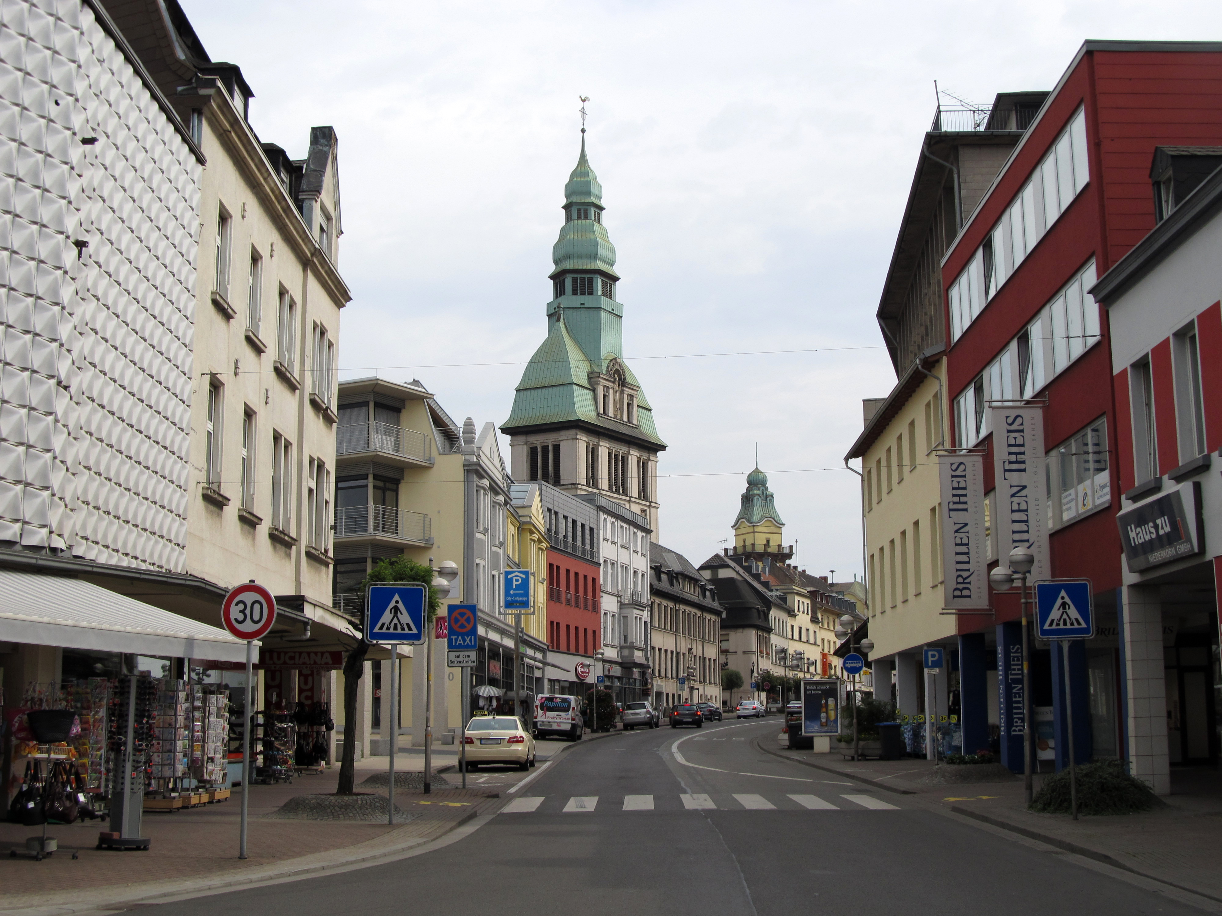 Blick in die Rathausstraße in Völklingen, Saarland